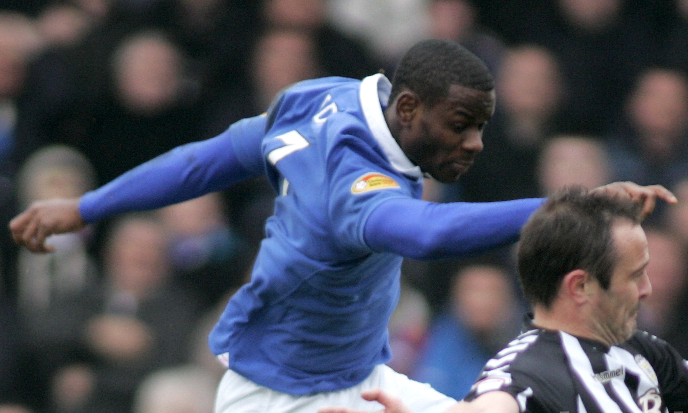 Edu Chance